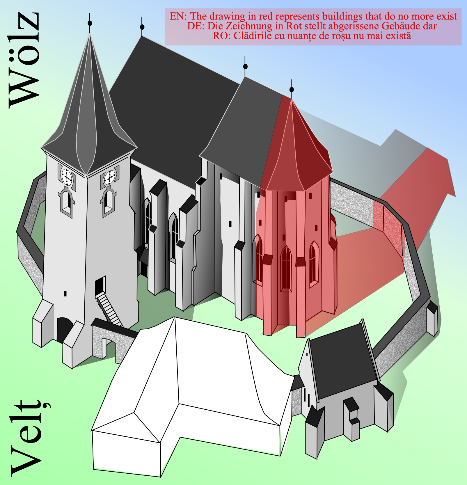 Biserica fortificata din Velt.